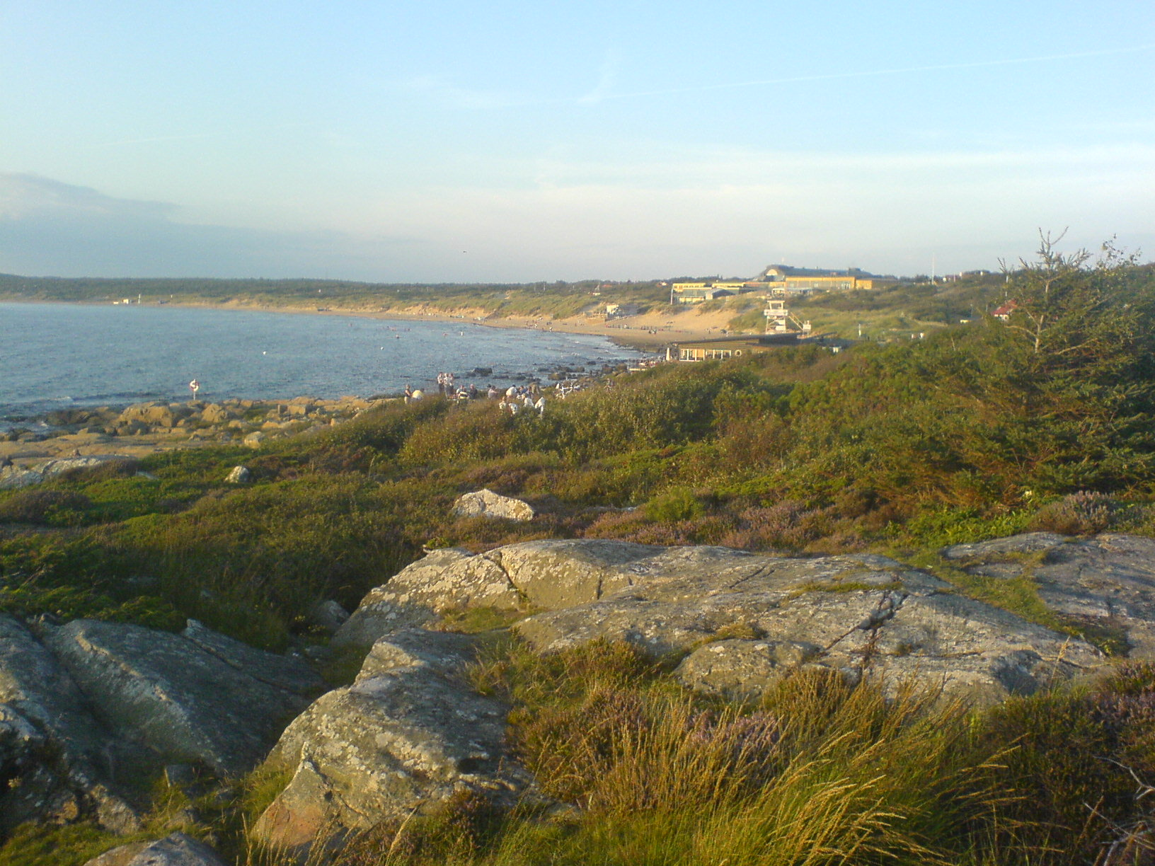 Hotellet och stranden från Tyludden.